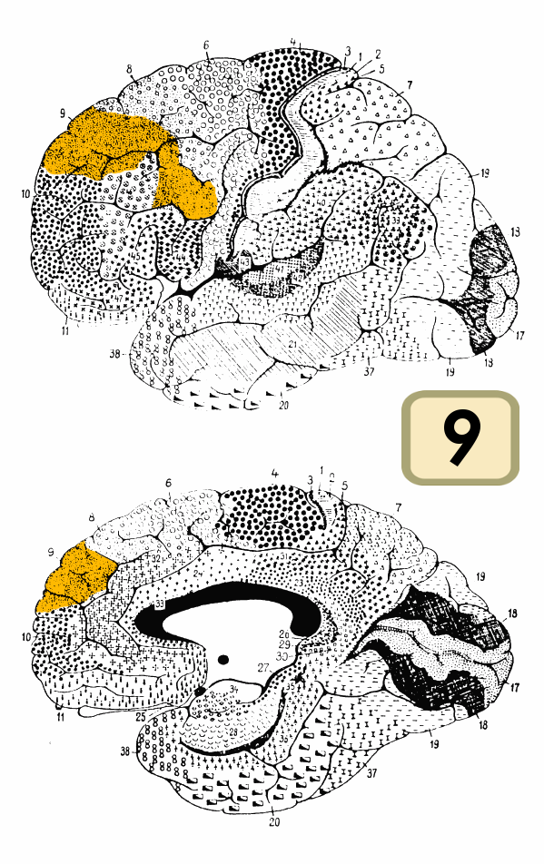 Brodmann area 9.